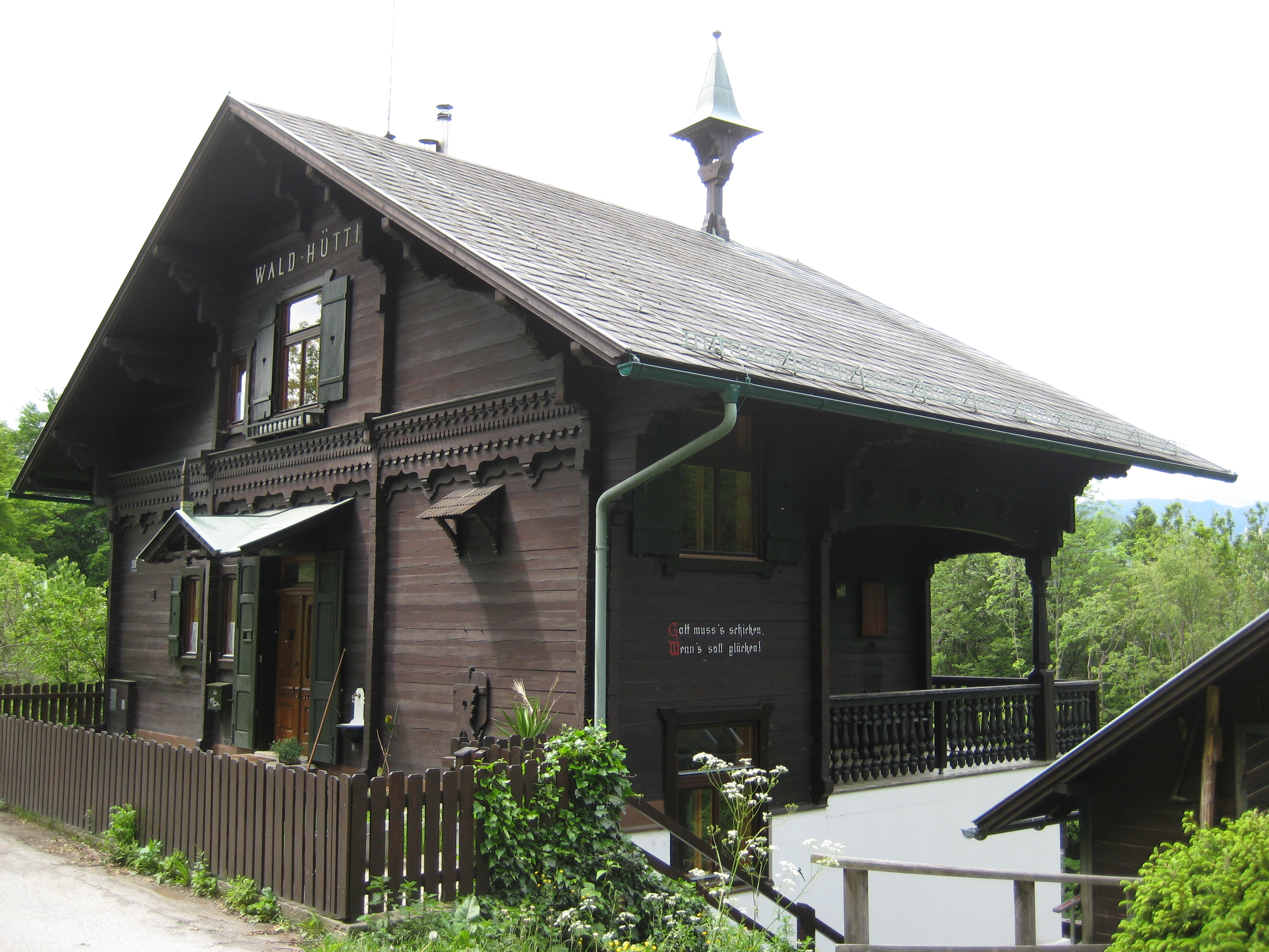 „Villa Waldhütte“ in Reichenau an der Rax (Niederösterreich), Schneebergweg 20, von der öffentlich zugänglichen Straße aus fotografiert. Eine Tafel nahe dem Zaun der Villa trägt folgende Aufschrift: „Der Arzt Friedrich Schauta hatte durch seine neuen Operationsmethoden als Gynäkologe Weltruf erlangt. Er verbrachte ab 1883 jeden Sommer in Reichenau und wohnte meist im Thalhof. 1904 ließ er sich in der Nähe dieses Nobelhotels eine kleine Villa erbauen, die er liebevoll ‚Waldhütte‘ nannte. Planverfasser und Erbauer waren die bei vielen Villenbauten bewährten heimischen Bauunternehmer Carl Postl und Carl Weinzettl. Der seit seinem Entstehen unveränderte den Villenbauten des Semmerings nachempfundene Holzbau wurde 1967 von der Stadt Wien erworben und wird seither als Forsthaus genutzt.“